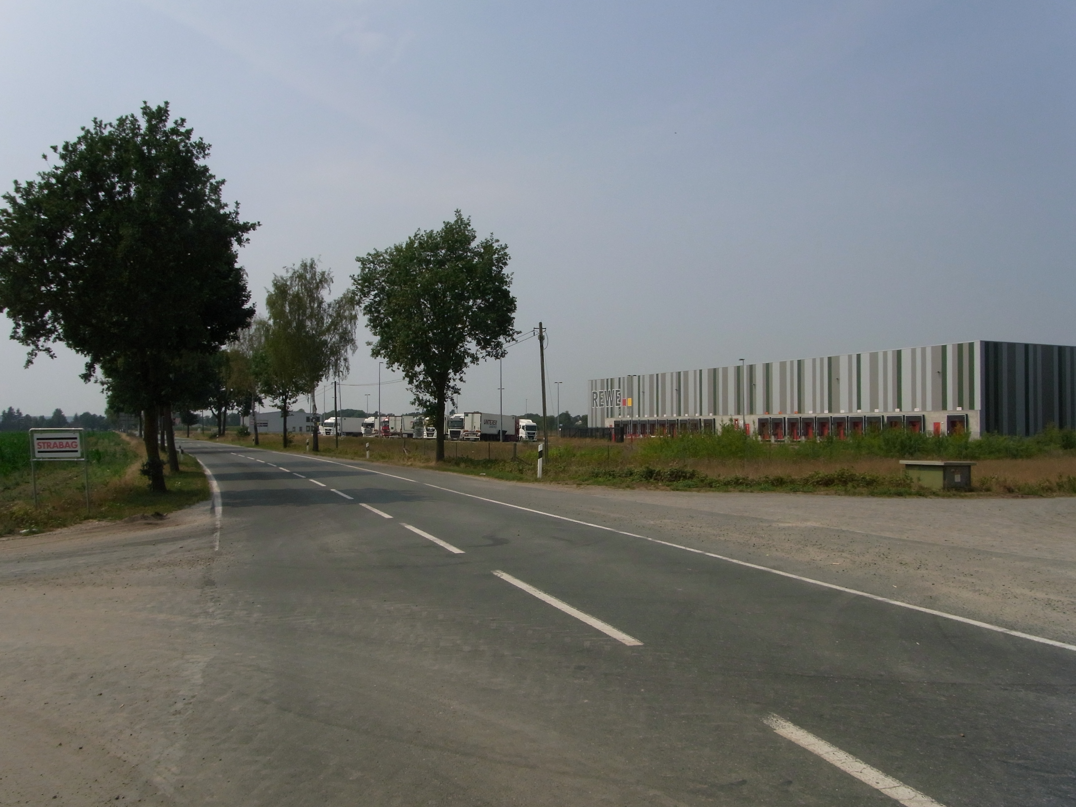 Zentrallager der Firma Rewe zwischen der Autobahn A7 und Berkhof